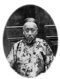 中国近代银行家、书画家严信厚